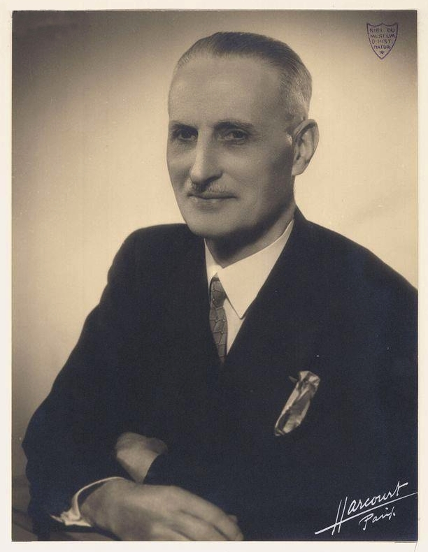 Portrait de Camille Arambourg par le studio Harcourt, 18 x 23,5 cm. Paris, vers 1940 (?). Collections du museum national d'histoire naturelle, Paris.